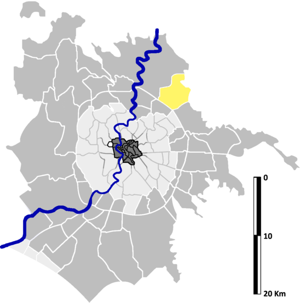 Tor San Giovanni